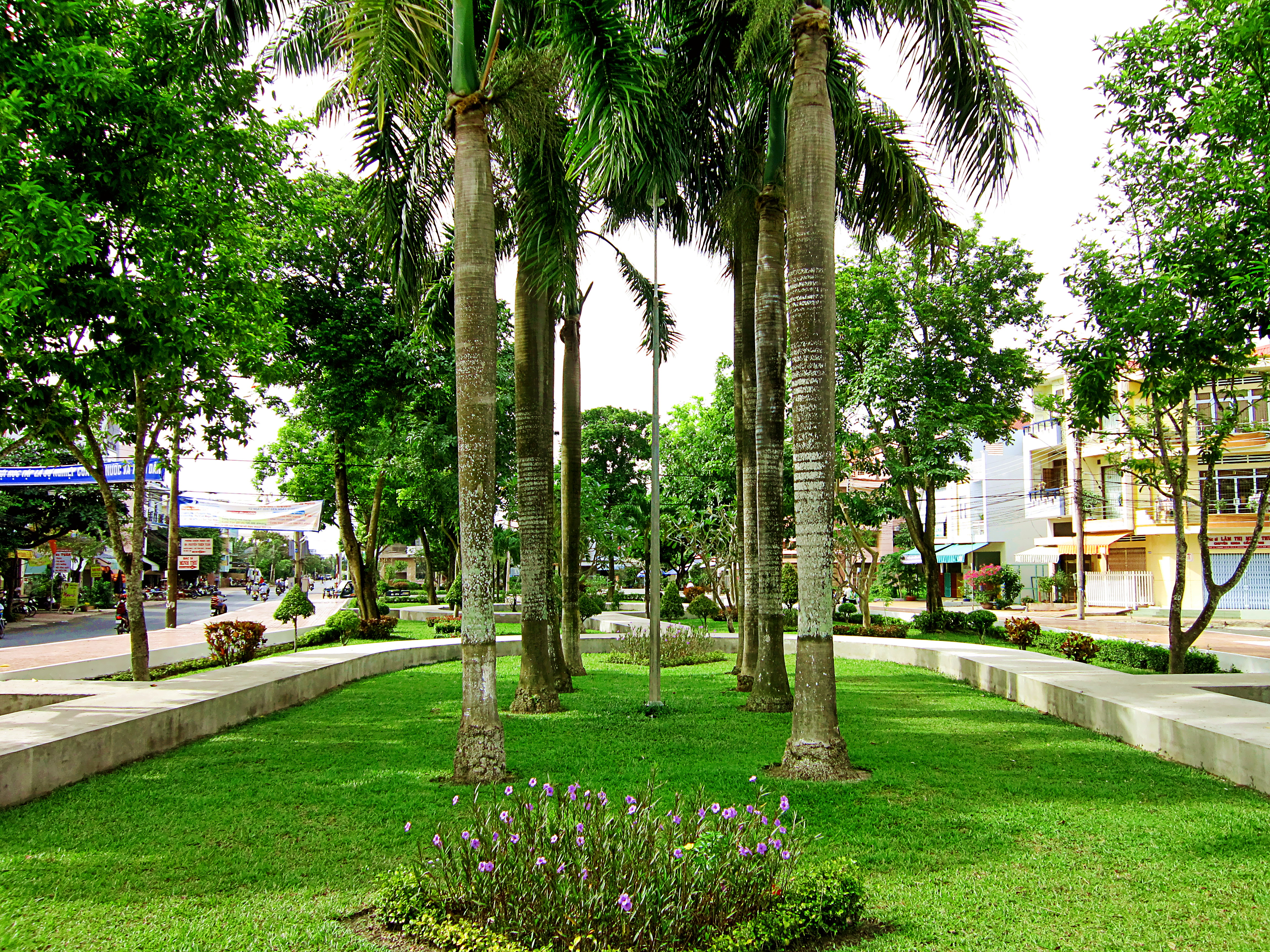 Công viên của phường Đông Xuyên, thuộc thành phố Long Xuyên, tỉnh An Giang, Việt Nam.